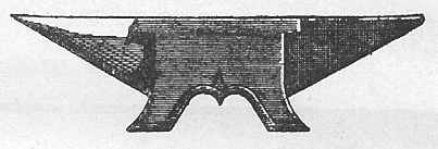 enclume de serrurier fin 19 è siècle